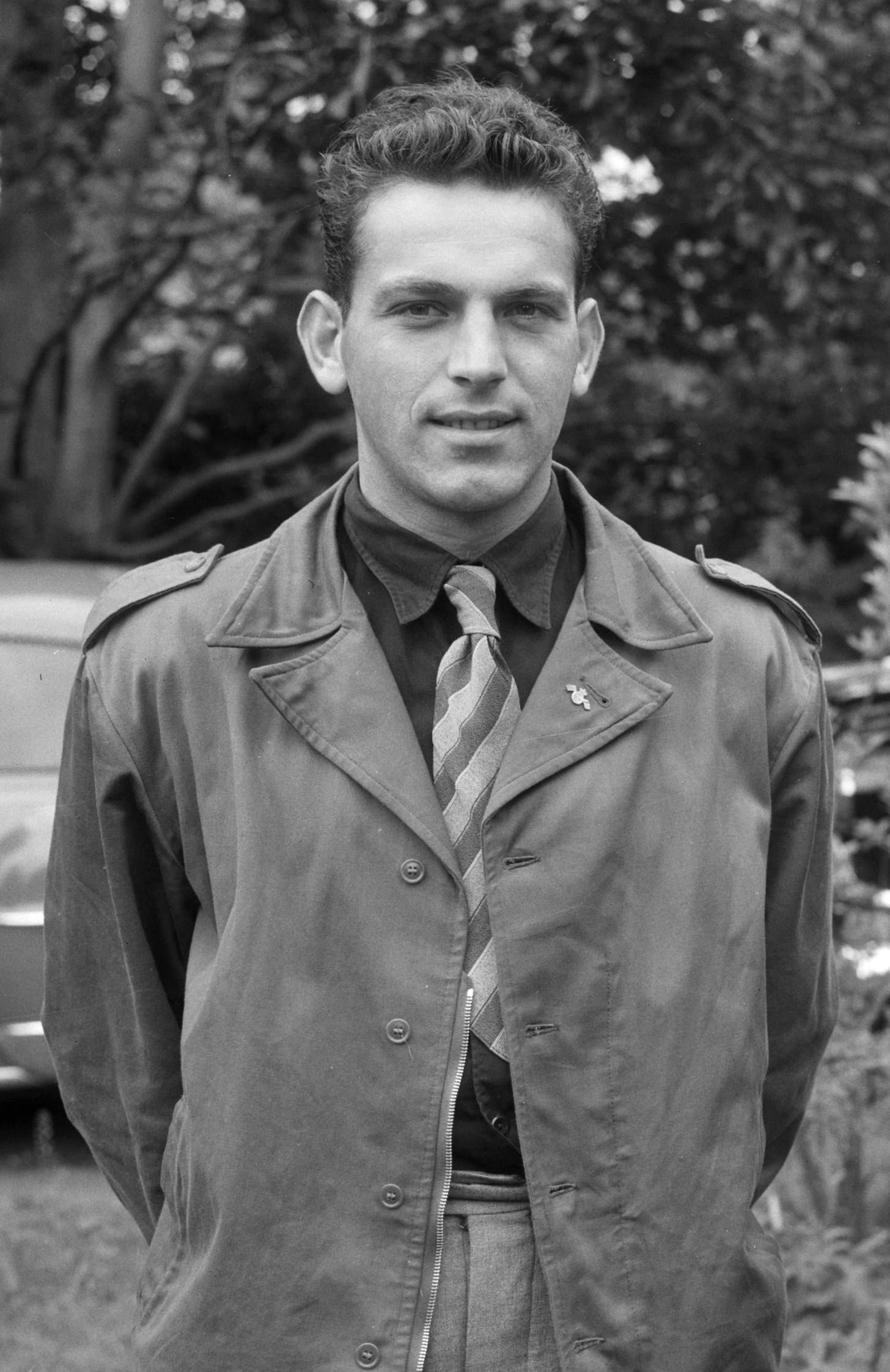 Ondertekening van contracten van Tour de France ploeg t huize van Cees Pellenaars te Breda, Jules Maenen